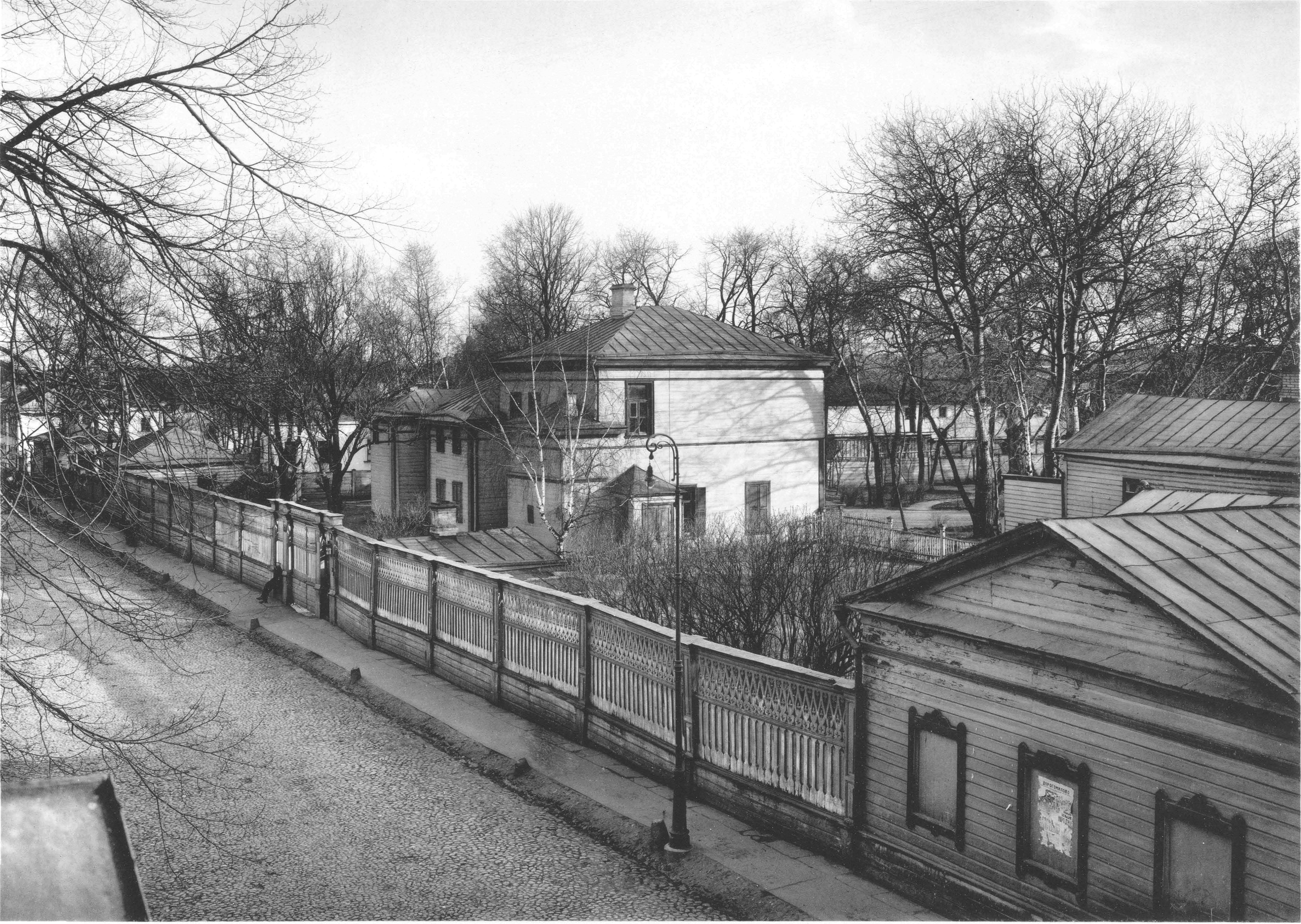 51. Домъ графа Л. Н. Толстого, прiобрЪтенный городомъ (Москва)